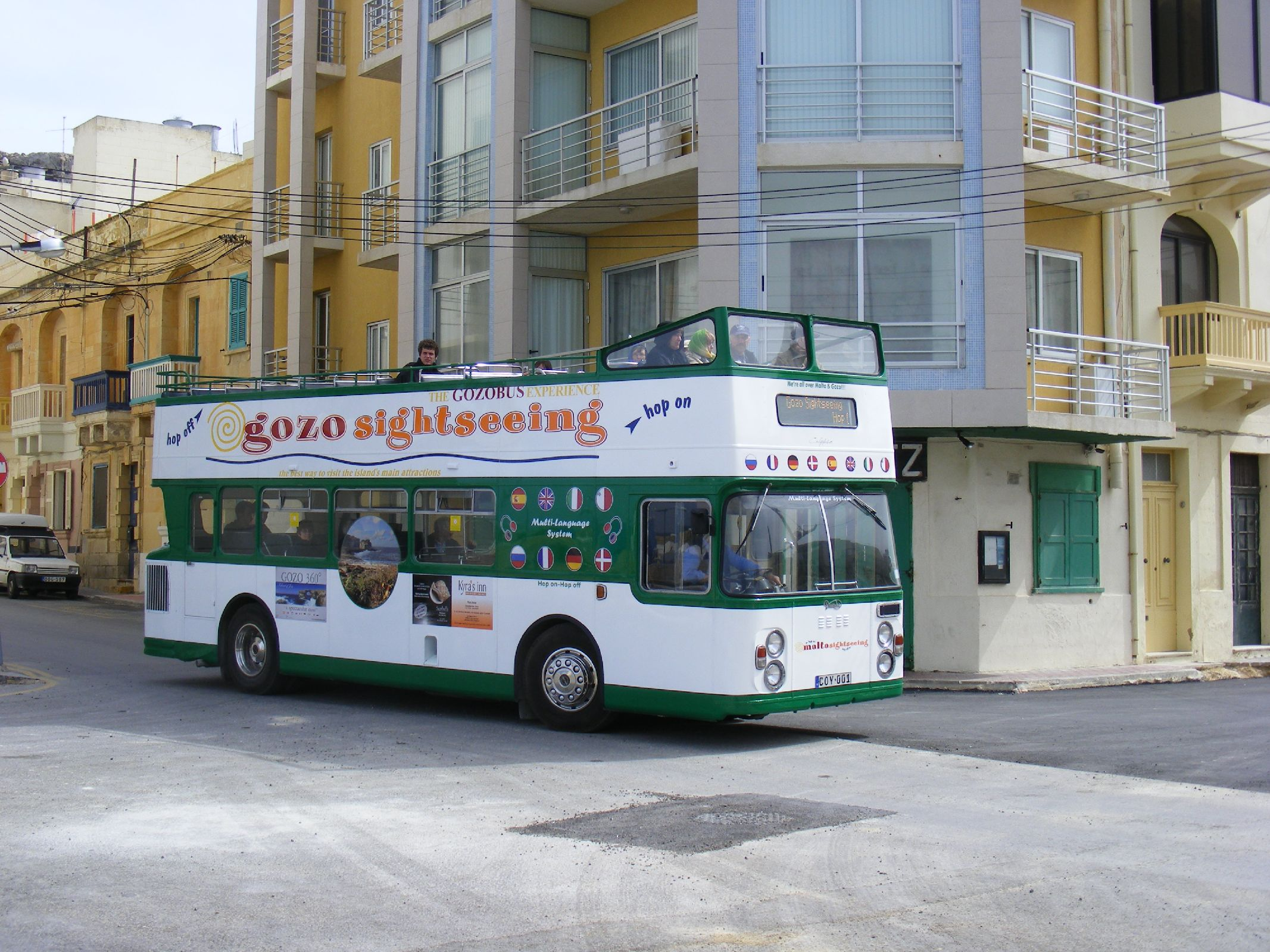 COY001 Gozo Sightseeing open-top Gozobus, Marsalforn